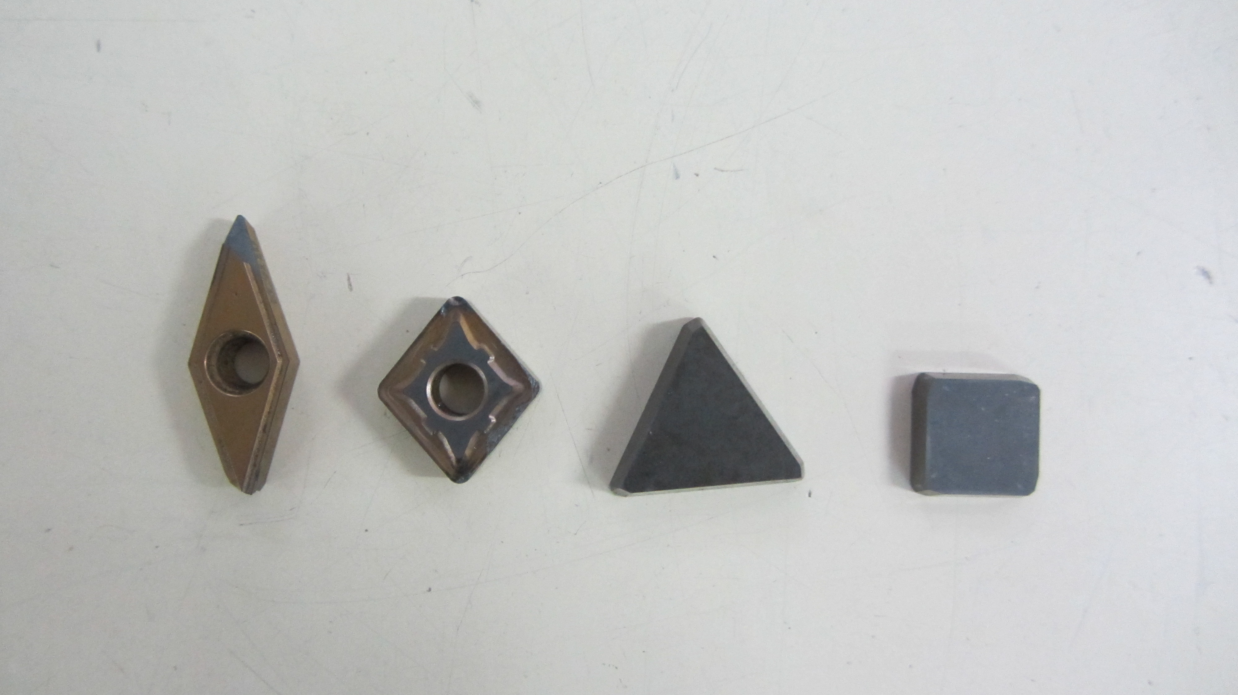 Puntas